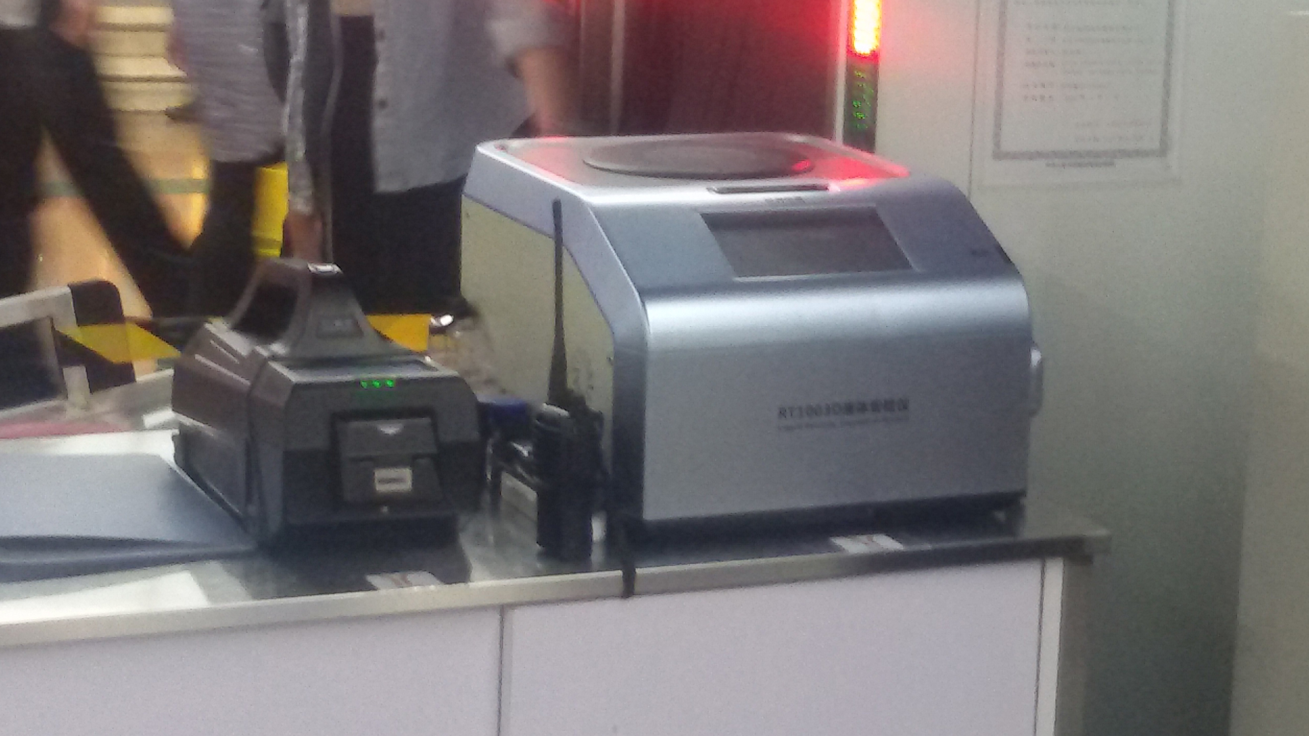 粵語: 液體檢測儀同埋核素識別儀